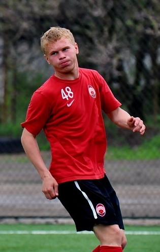 Никита Григорьевич Кислый — украинский футболист.